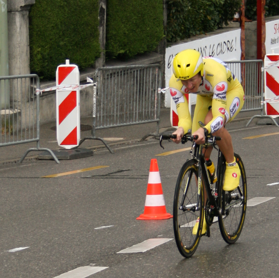 Reinbert Cornelis Wielinga prologue du Tour de Romandie 2007